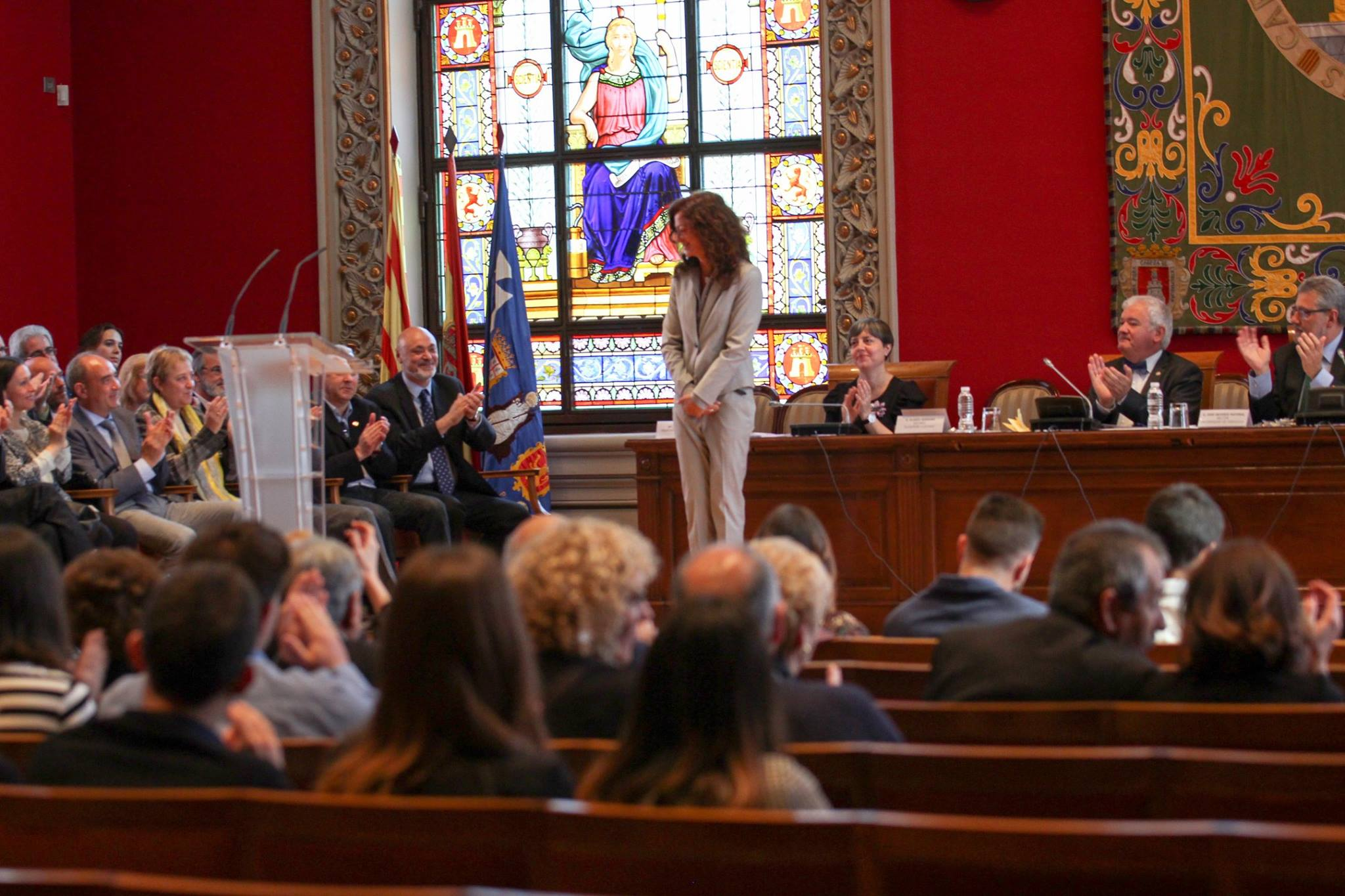 Carmen París recibiendo, el 21 de abril de 2017, en el Paraninfo de la Universidad de Zaragoza, el galardón de Alumna distinguida de la Facultad de Filosofía y Letras, en el marco de la solemnidad del patrón universitario, San Isidoro de Sevilla.